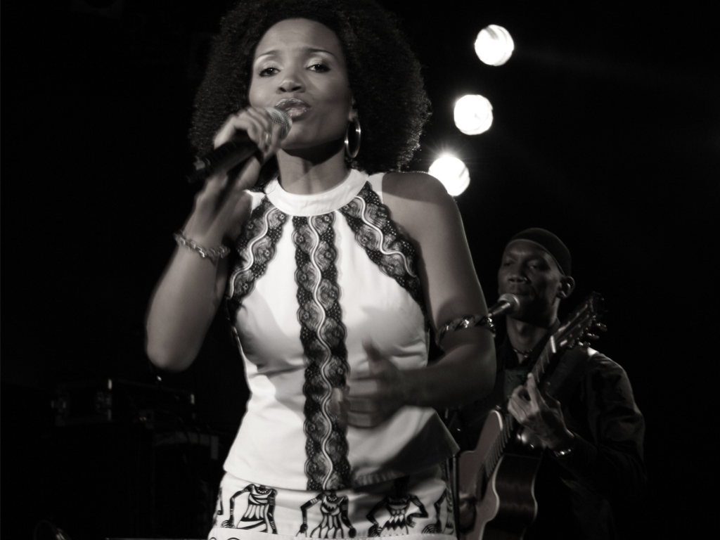 Milano - Italy